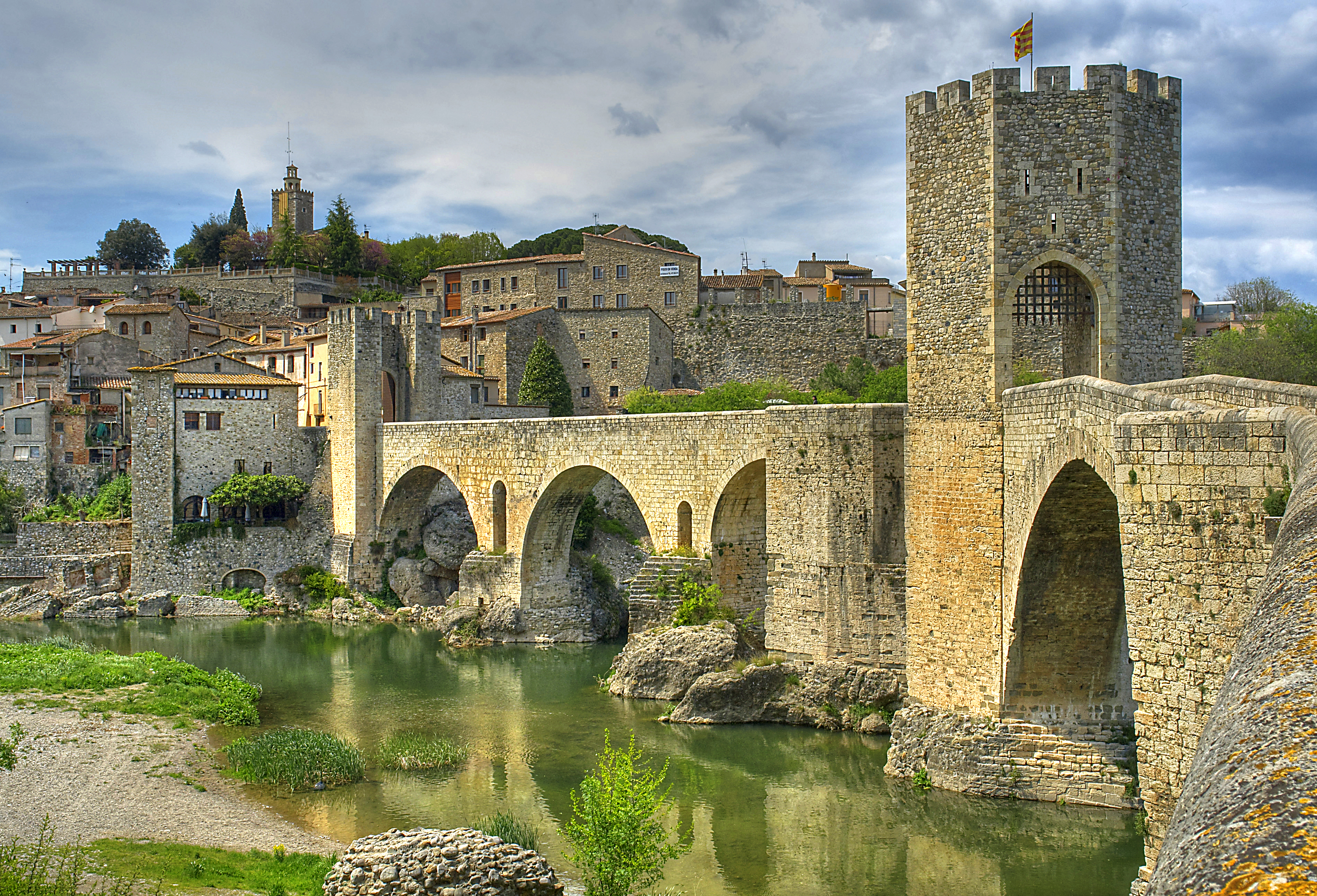 Besalú i el seu pont medieval.